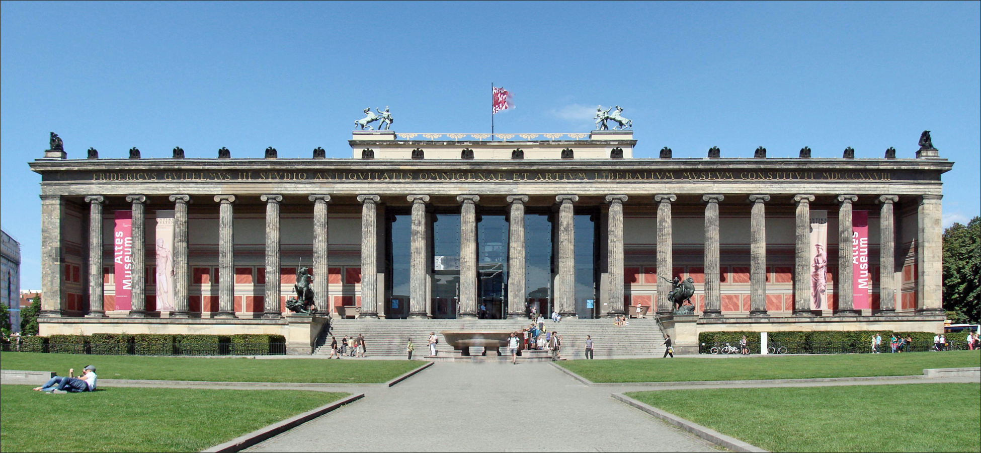 La façade de l'Altes Museum L'idée d'implanter un musée à Berlin date de 1797. L'objectif était de montrer au public les oeuvres dissimulées dans les châteaux et de créer "une école de formation du goût". Plusieurs projets existaient mais c'est celui de Karl Friedrich Schinkel qui a été retenu par le Roi. Le bâtiment de l'Altes Museum (ancien musée) a été construit entre 1823 et 1828 face au Château par Karl Friedrich Schinkel dans un style néoclassique, avec une colonnade ionique (18 colonnes), pour abriter la collection d'art de la famille royale prussienne. Il a ouvert ses portes au public en 1830 pour le soixantième anniversaire de Frédéric Guillaume III. La rotonde originale se réfère au Panthéon de Rome. Elle était invisible depuis l'extérieur car elle ne devait pas entrer en compétition avec le dôme de la cathédrale voisine. (extrait de Wikipedia) L'Altes Museum se trouve aujourd'hui à l'entrée de l'île des musées. Il présente des collections d'antiquités grecques, étrusques et romaines. Article Wikipedia sur l'Altes Museum (Berlin) site officiel Le projet Museumsinsel (parcours continu dans les musées de l'île)